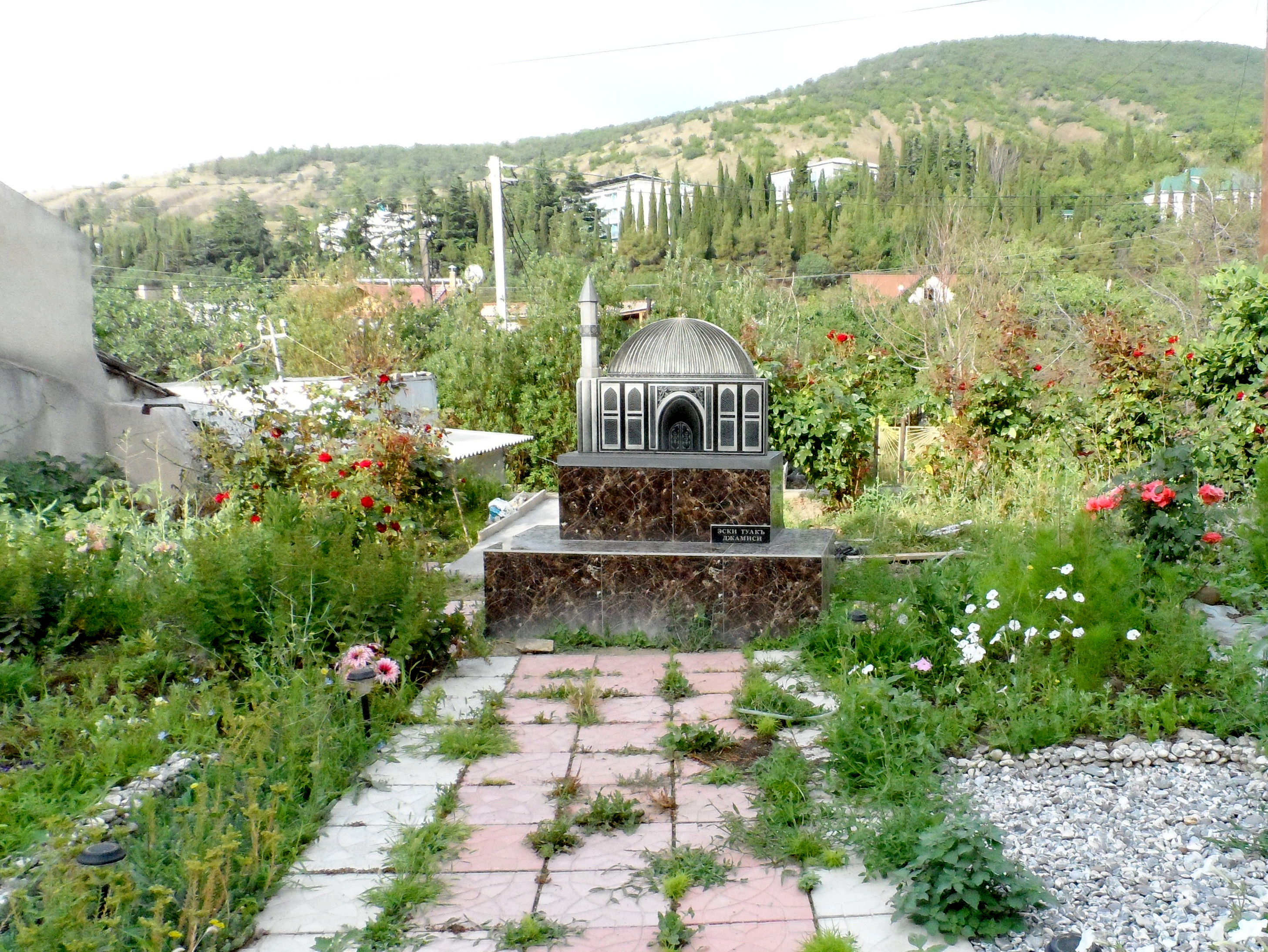 Пам'ятний знак на місці Старої мечеті в селі Рибаче, Крим (до 1945 р. - Туак). Мечеть зруйнована після депортації кримських татар. Фото 2013 року.